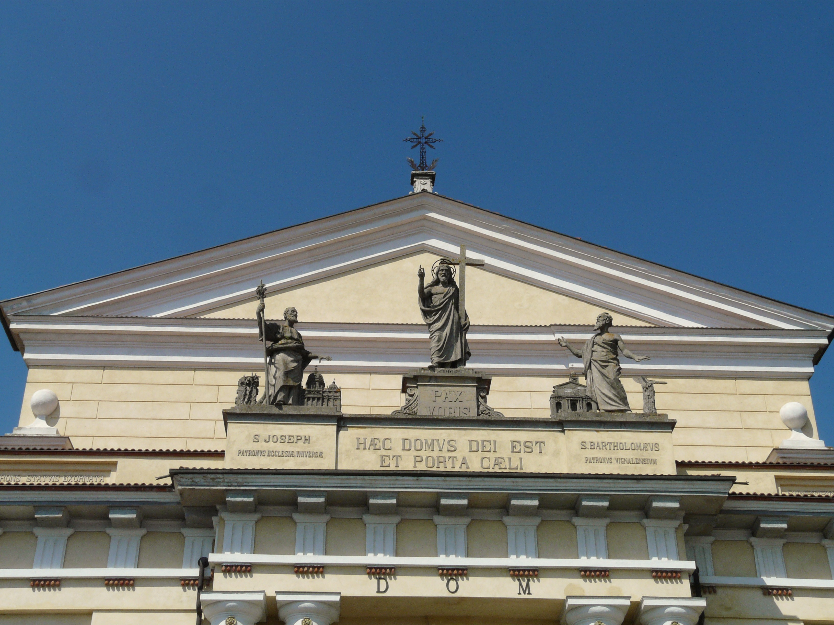 Chiesa di San Bartolomeo, Vignale Monferrato, Piemonte, Italia